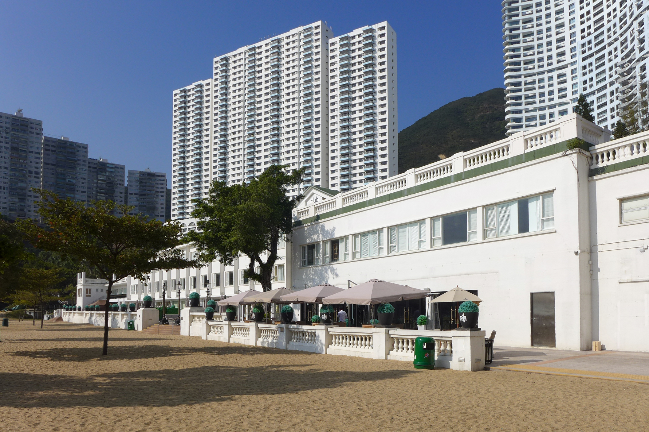 ClubONE Repulse Bay